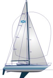 Aphrodite IOI, Ott Yacht GmbH, mit freundlicher Genehmigung